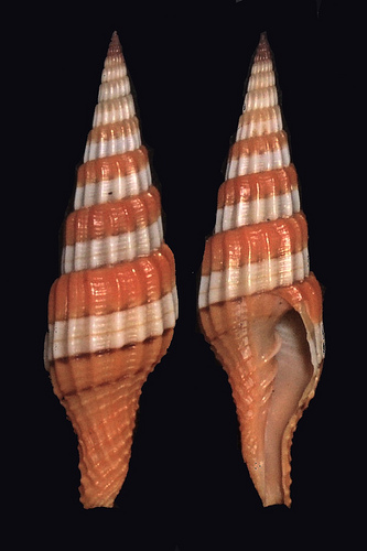 Vexillum (Vexillum) citrinum (Gmelin, 1791)